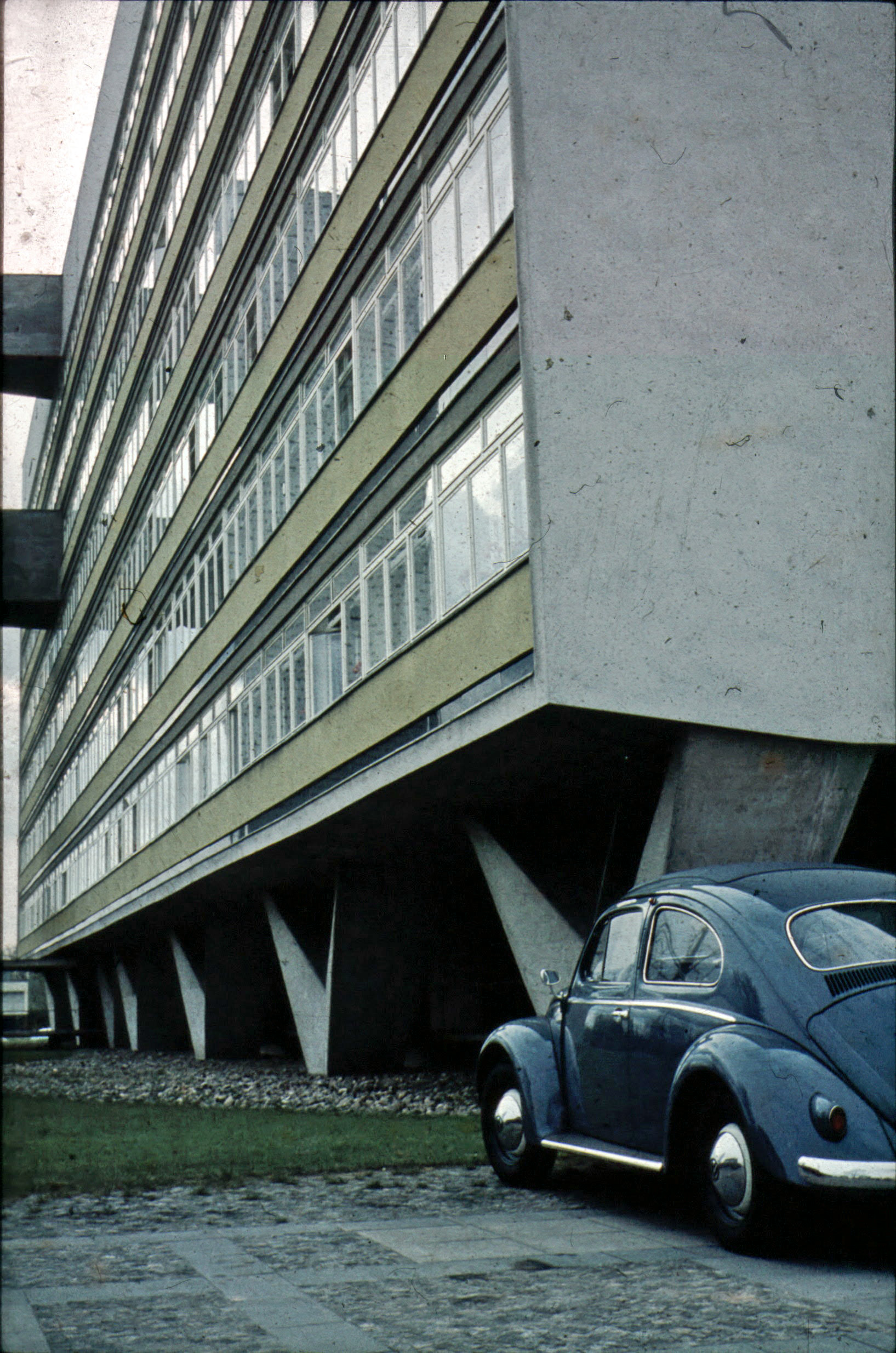 Niemeyerhaus im Hansaviertel Berlin